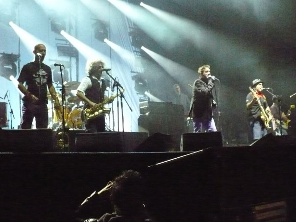 Los Fabulosos Cadillacs en Medillín, Colombia